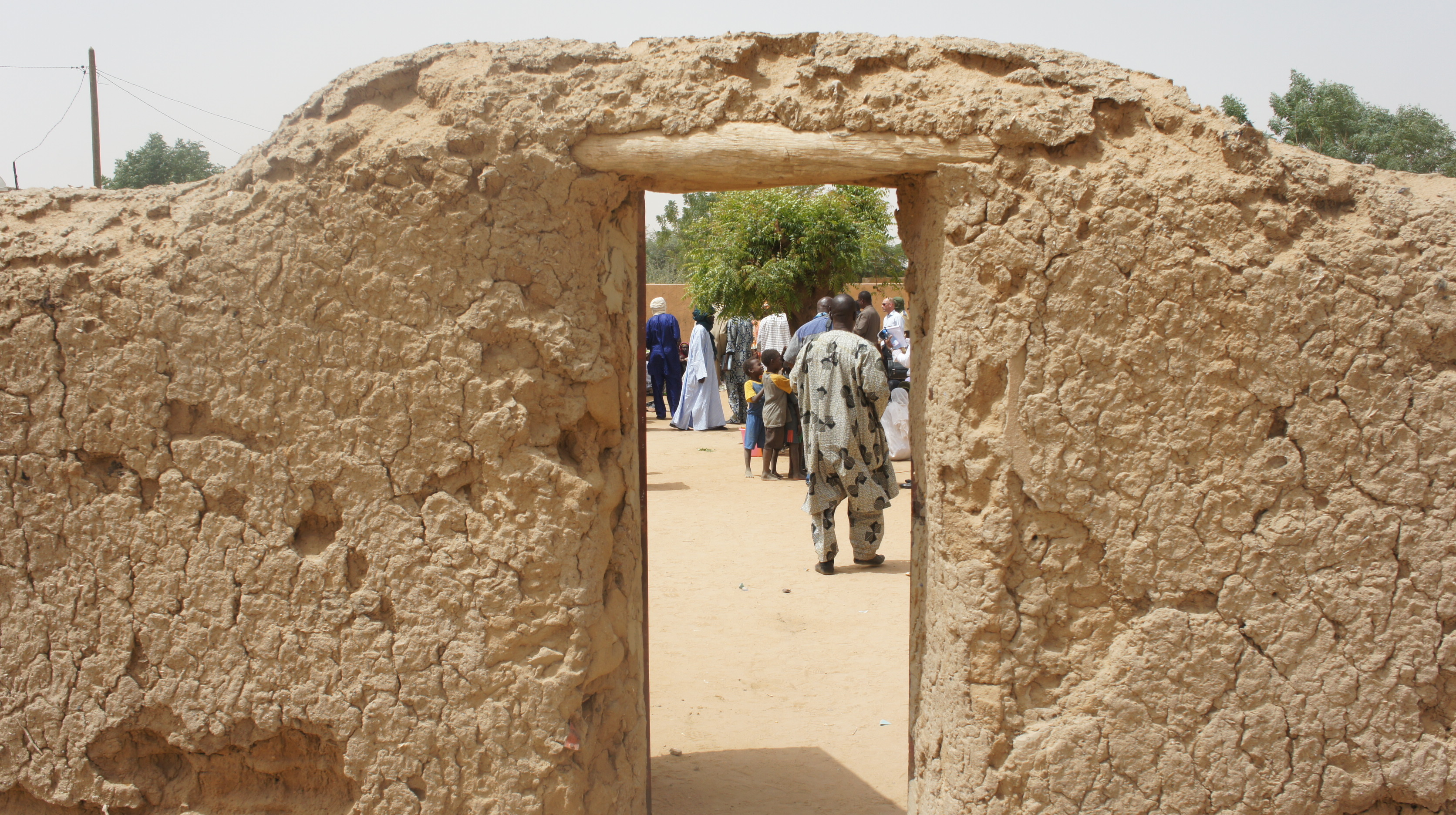 L’entrée de cette concession parmi tant d’autres où sont logés quelques centaines de déplacés, témoigne bien de ce que ce sont souvent des populations elles-mêmes pauvres qui ont fait montre d’une solidarité presque suicidaire.